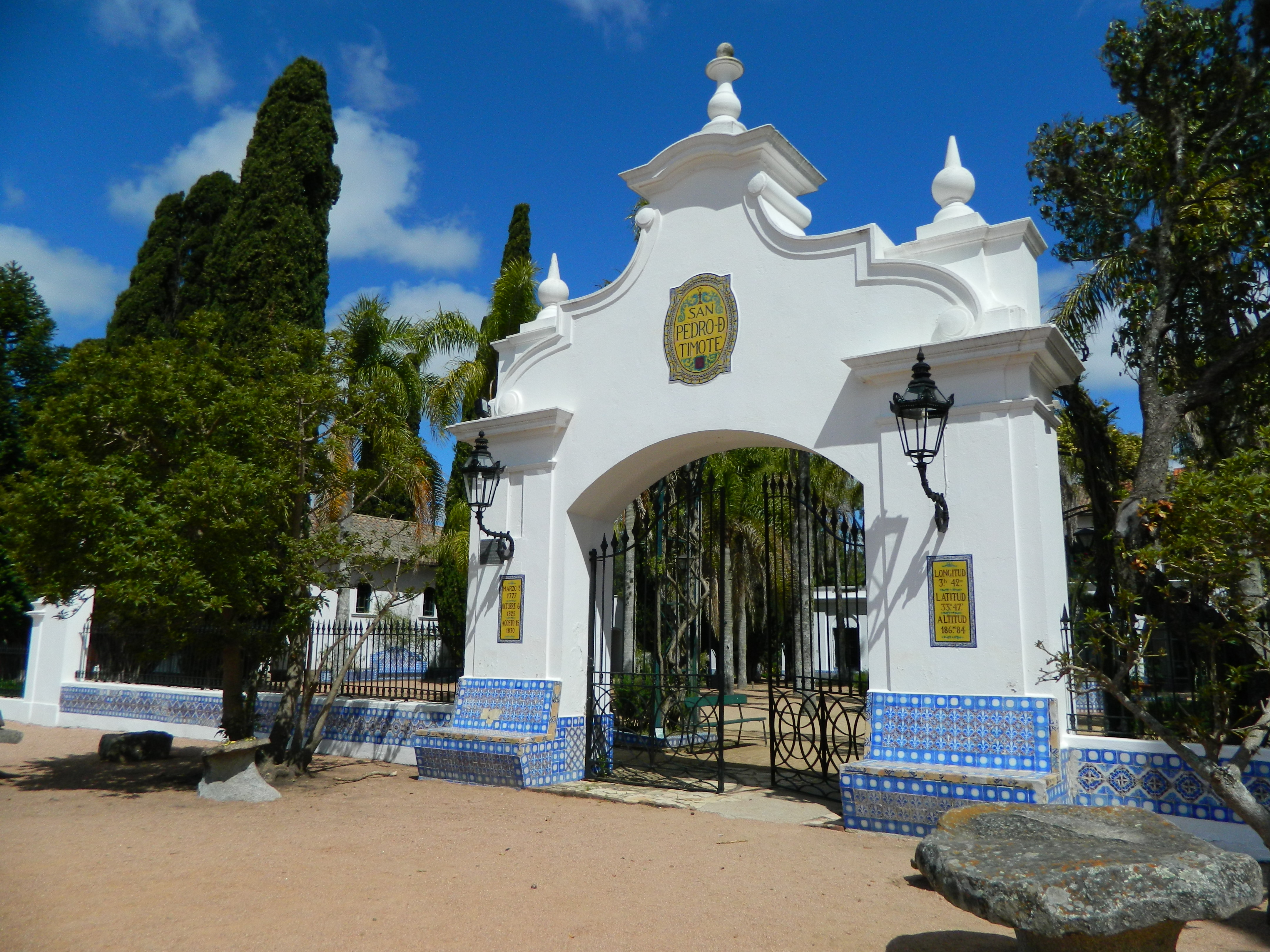 Estancia San Pedro de Timote. Ubicada en el departamento de Florida